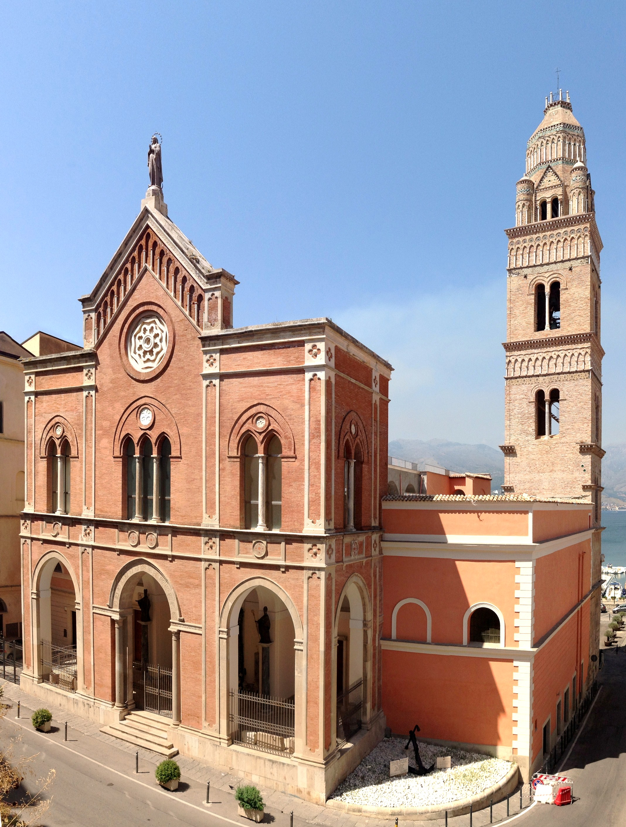 Veduta esterna della facciata e del campanile.